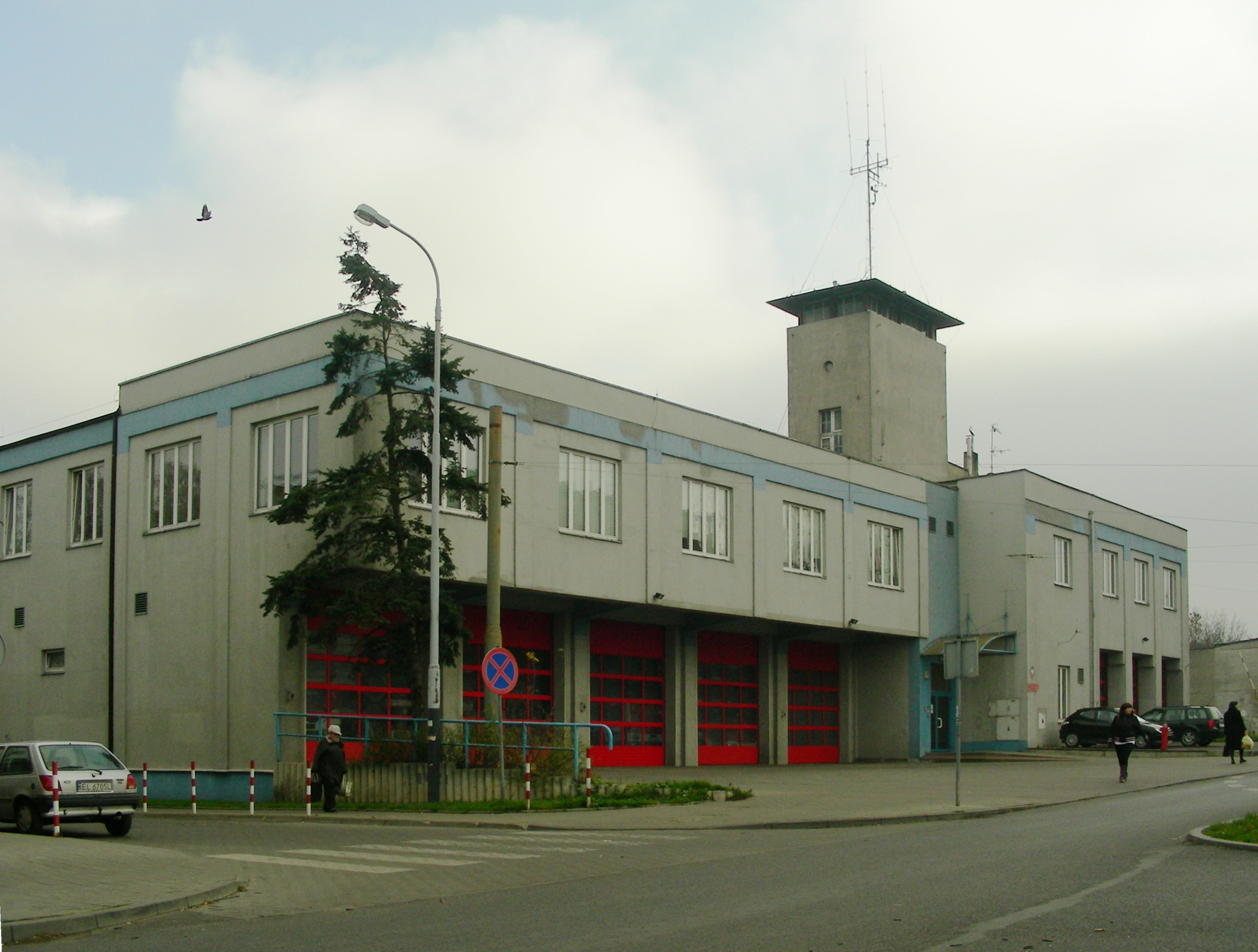 Remiza Jednostki Ratowniczo-Gaśniczej nr 1 w Łodzi i siedziba Komendy Miejskej Państwowej Straży Pożarnej w Łodzi